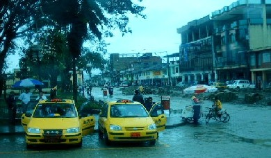 Parque Central de Yantzaza